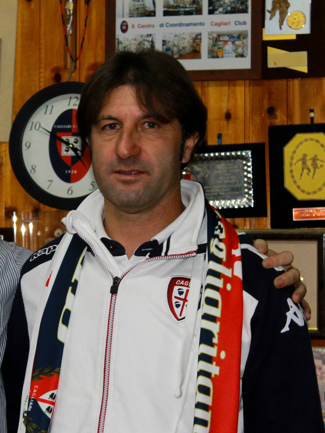 Massimo Rastelli, allenatore del Cagliari (2015)